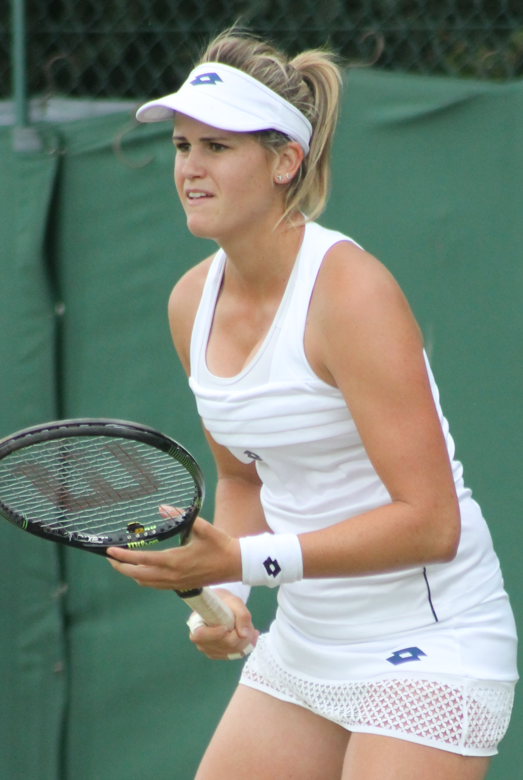 Torro Flor WMQ15 (3)